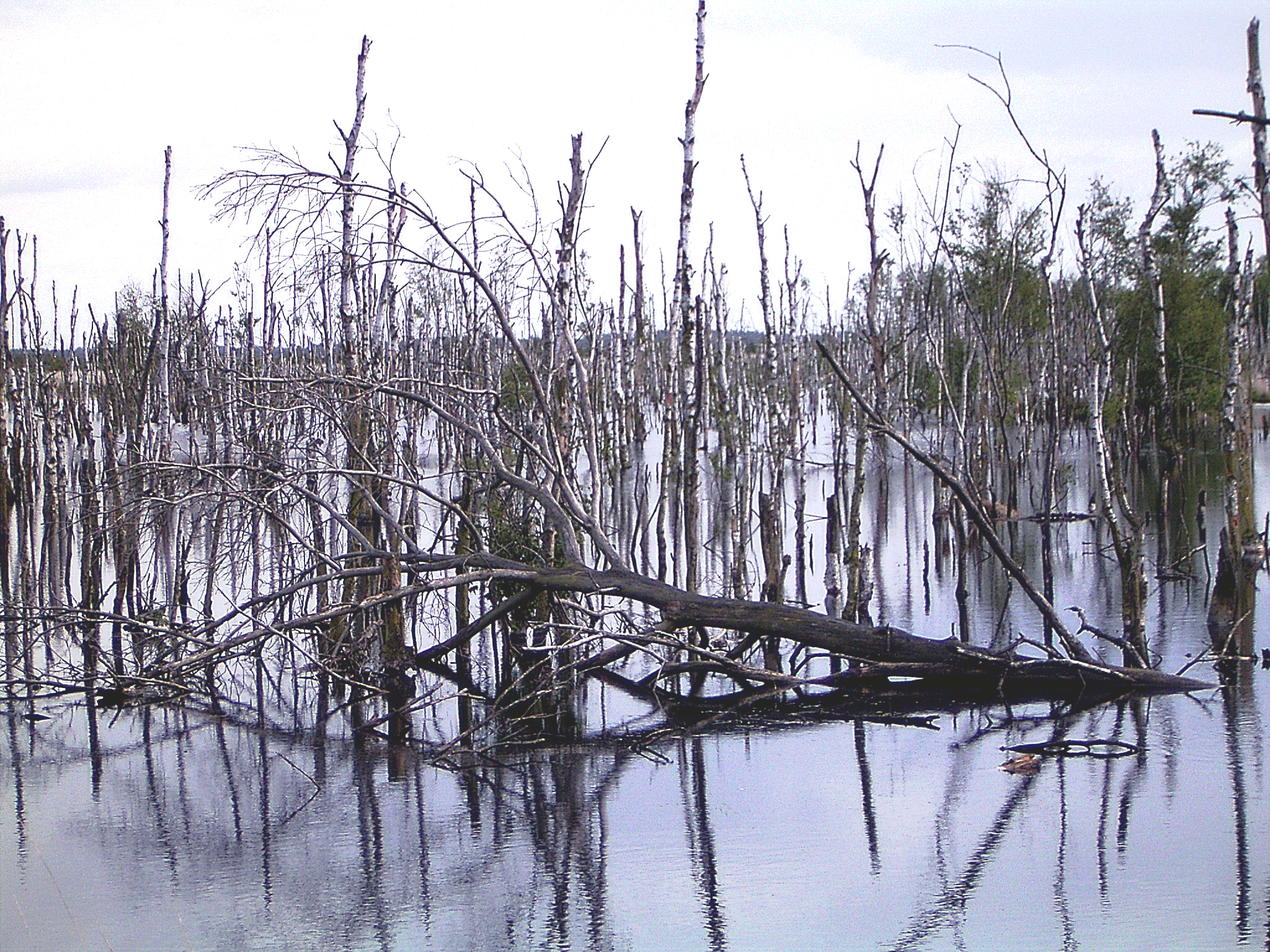 Wiedervernässung im Goldenstedter Moor bei Vechta (Niedersachsen)